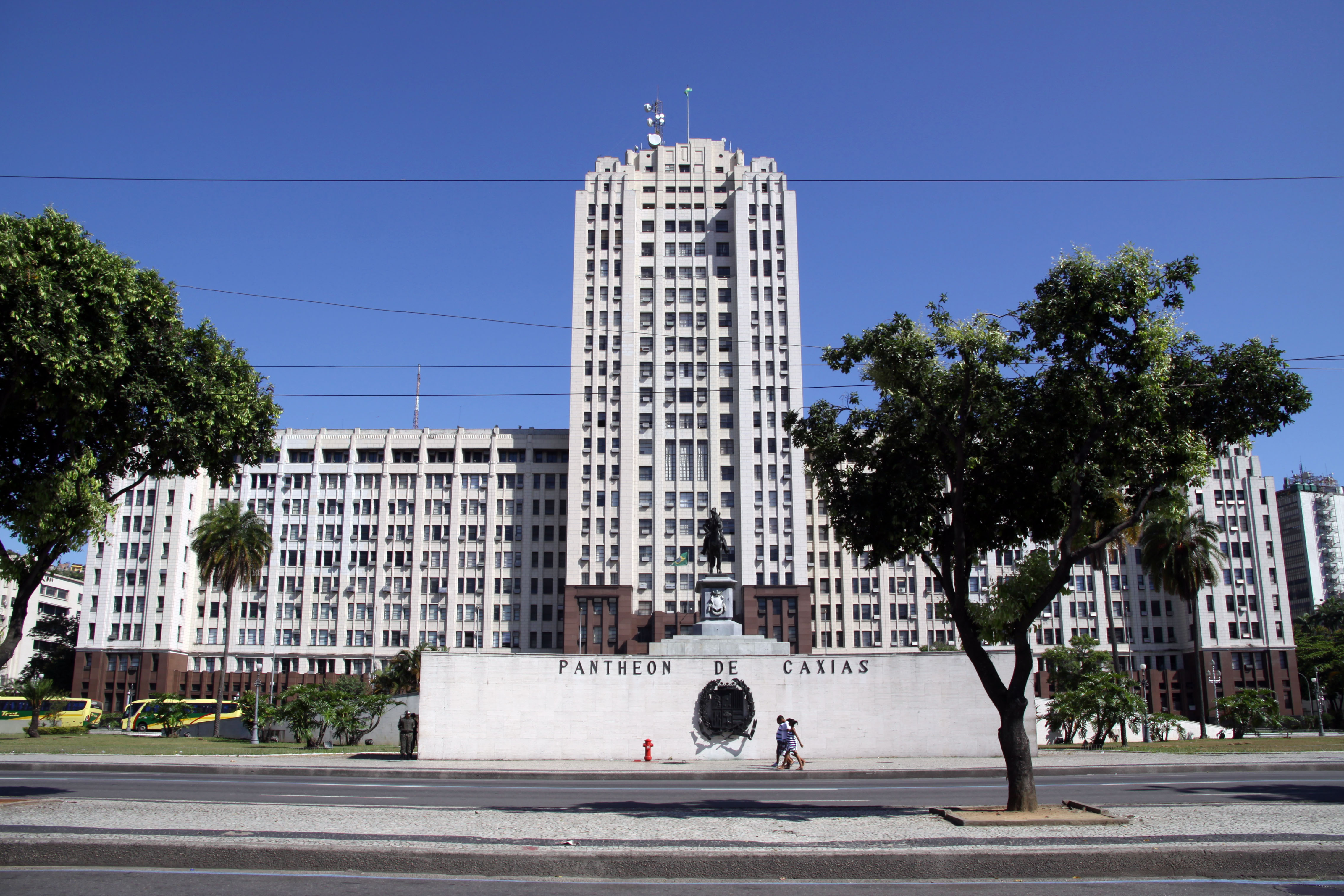 Pantheon de Caxias, Patrono do Exército Brasileiro, em frente ao prédio do Comando Militar do Leste na Praça Duque de Caxias.